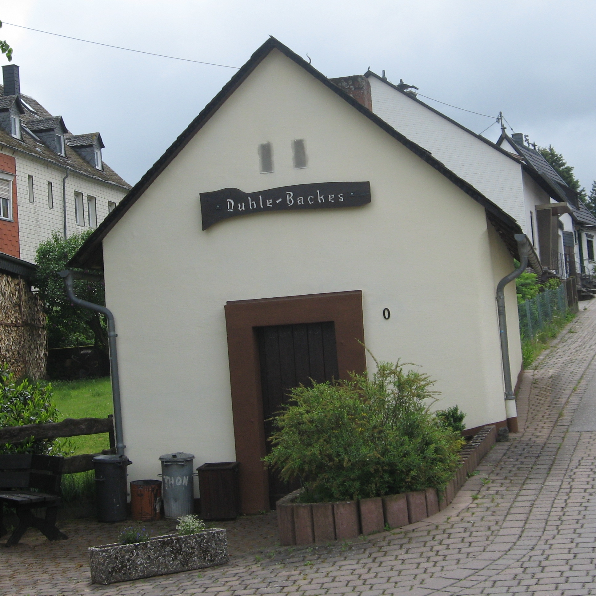 Altes Backhaus, Tiefenbach (Hunsrück)